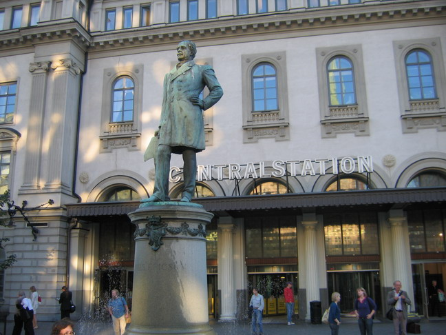 Stockholm center station,Sweden